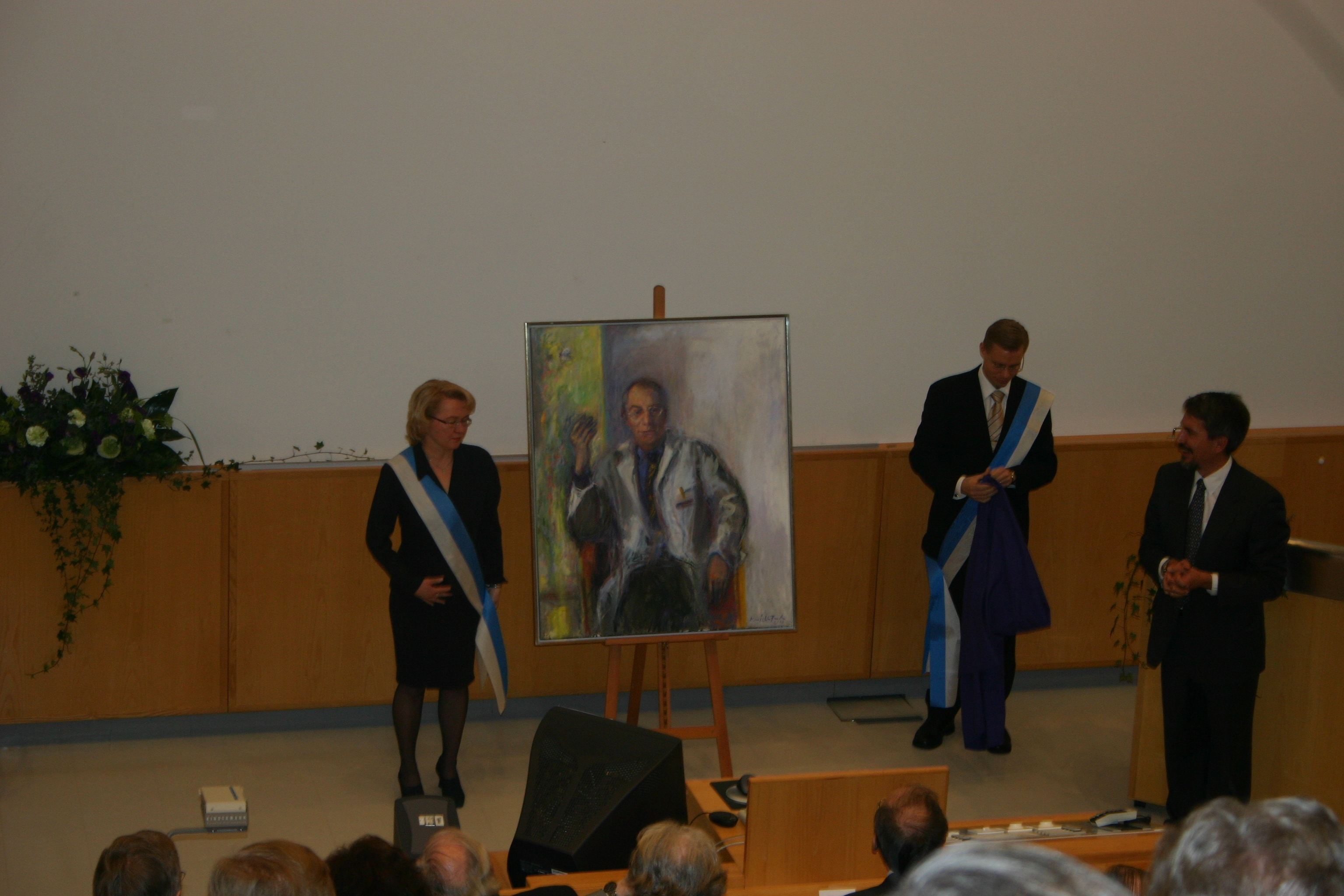 Airuet ylilääkärin muotokuvan paljastustilaisuudessa Iho-Allergiasairaalassa